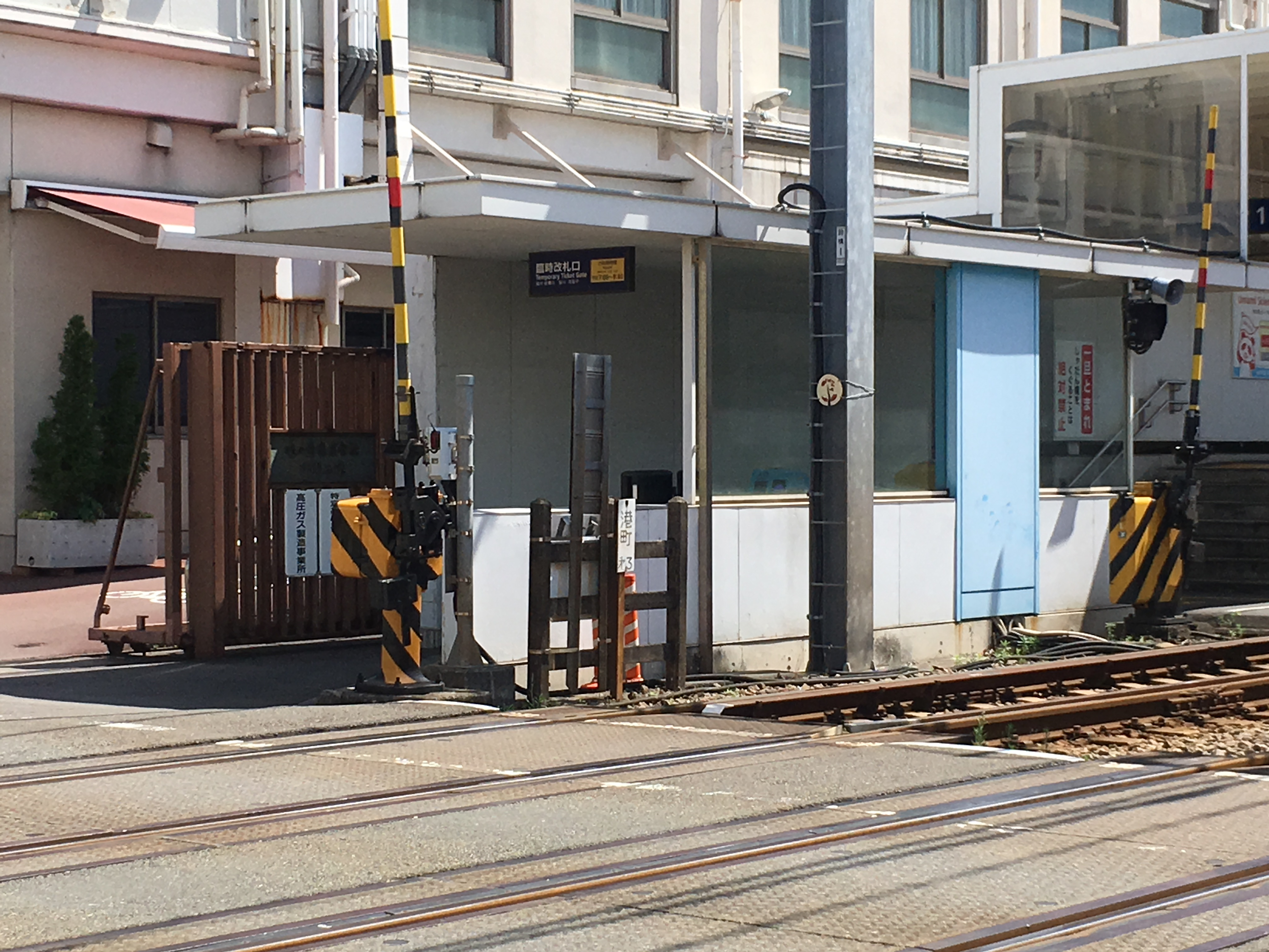 鈴木町駅の臨時出口。